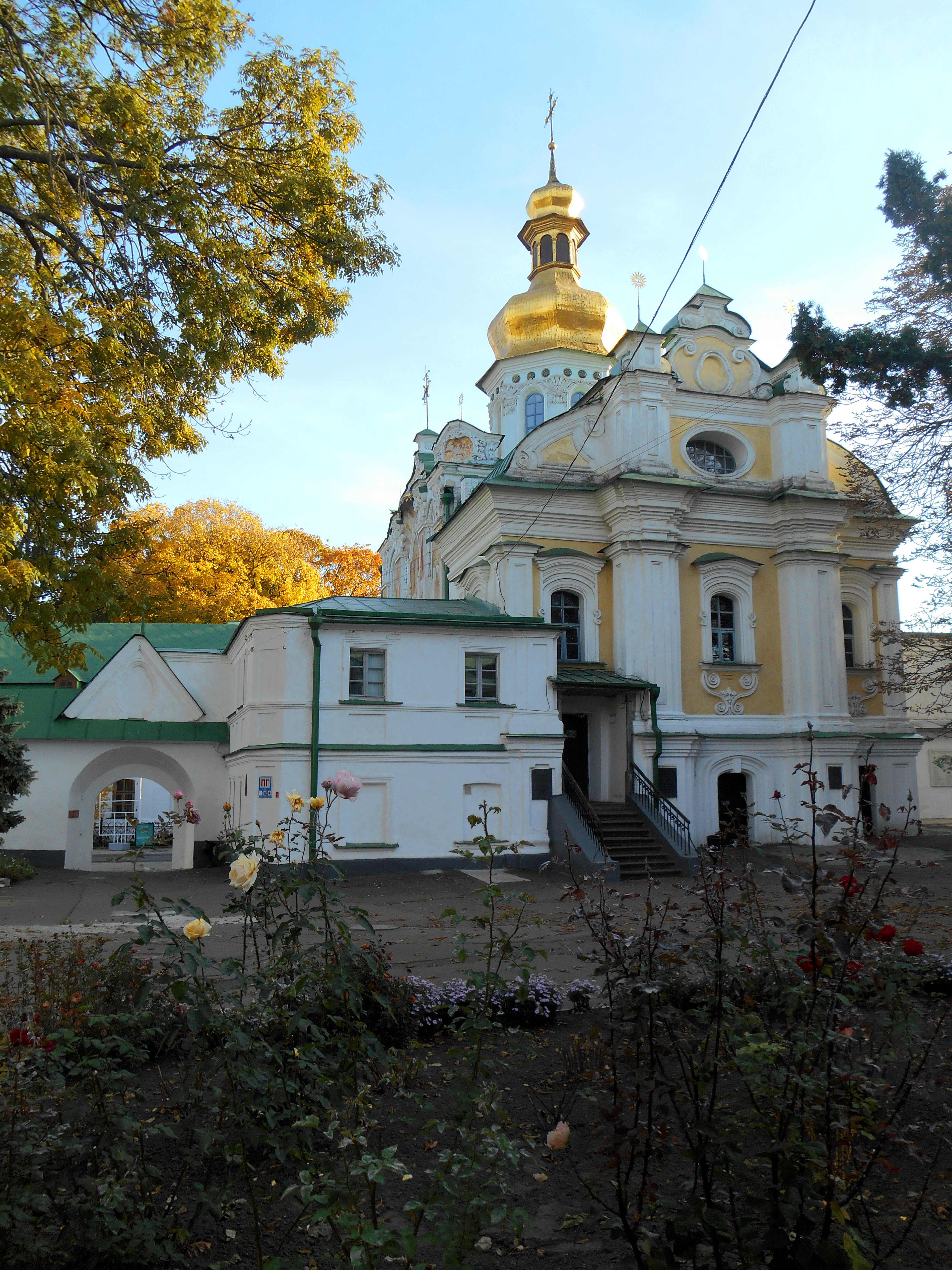 Церква Троїцька надбрамна, Київ, Лаврська вул., 9